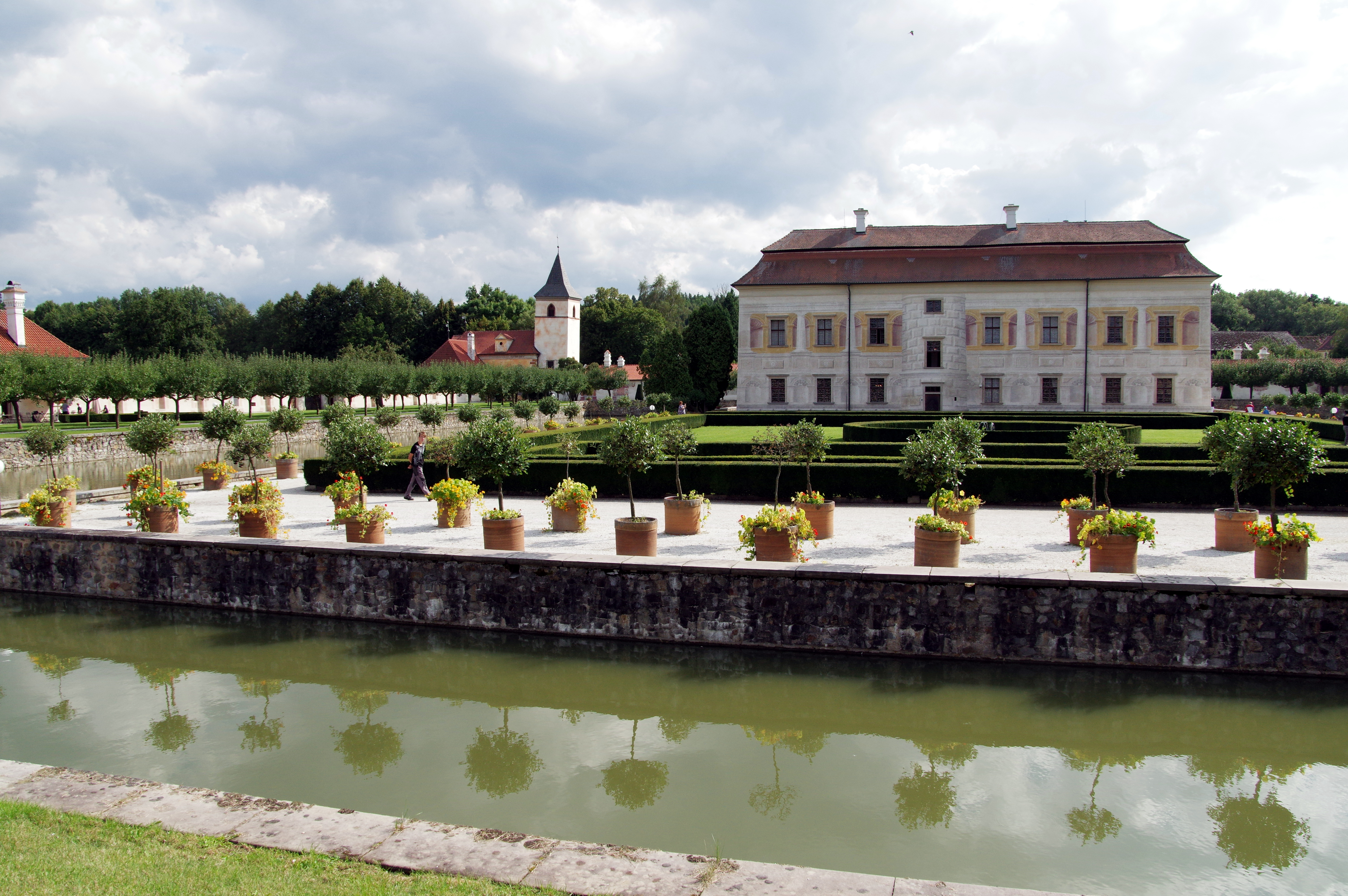 21.8.14 2 Zamek Kratochvile 14